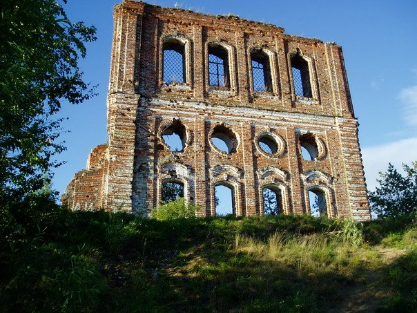 Остатки храма в исчезнувшем Коприно